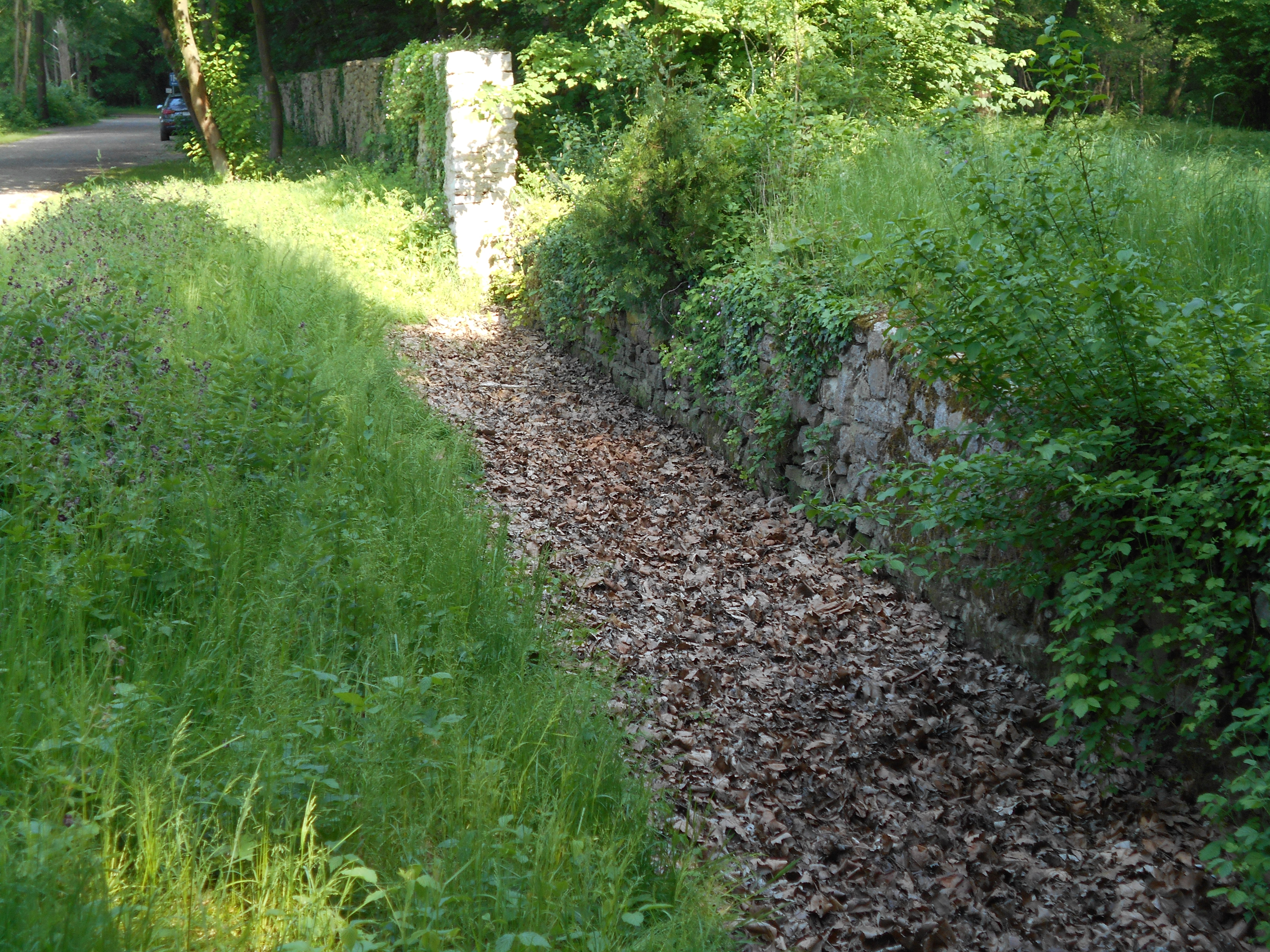 Graben ("Aha-Graben") als Begrenzung des Harrachparks